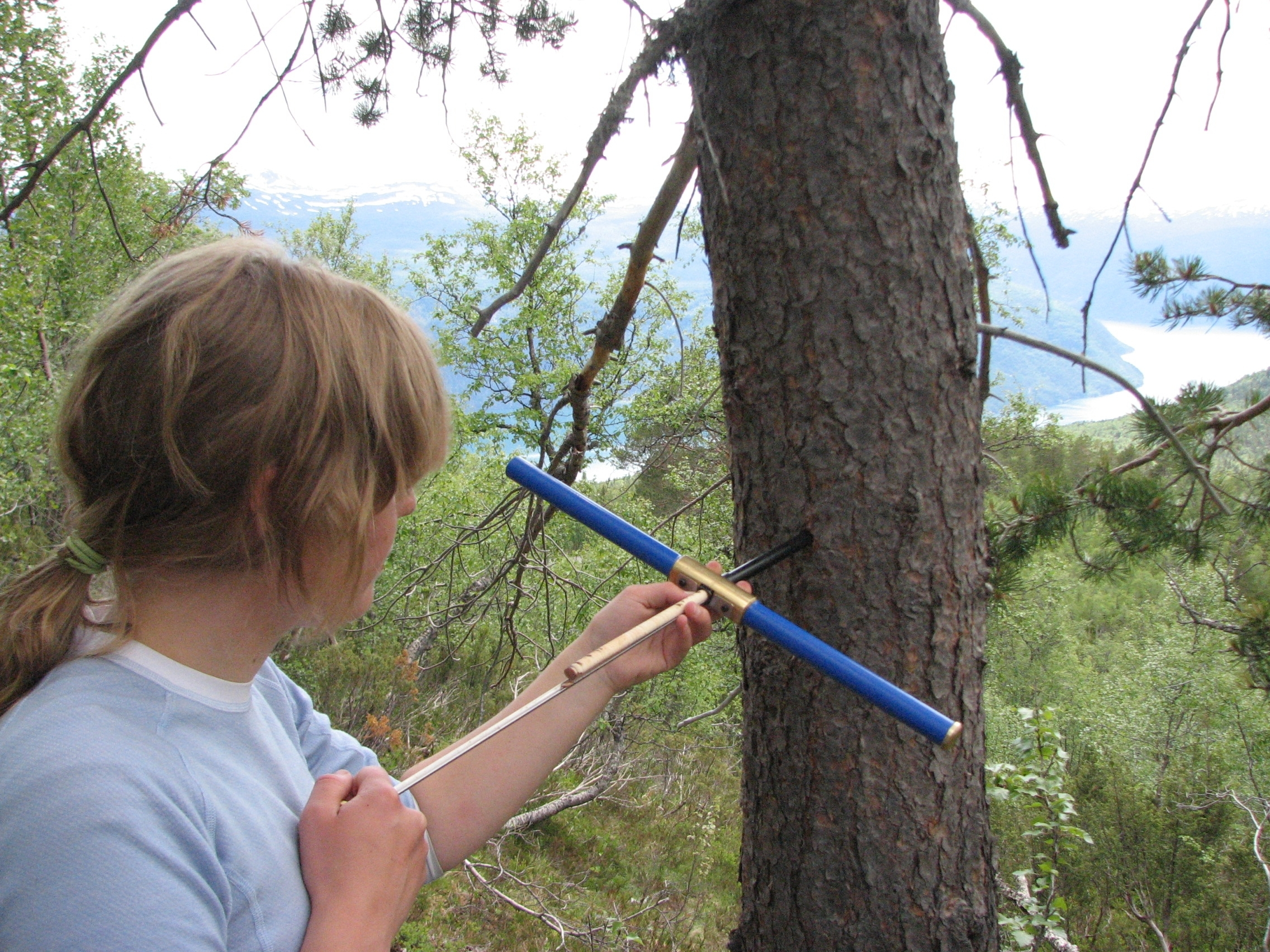 Uttaking av prøve til årringsdatering, i Sogndal Ved bruk. vennligst kreditér: Foto: Terje Thun, NTNU Vitenskapsmuseet If used, please credit: Photo: Terje Thun, NTNU Museum of Natural history and Archaology